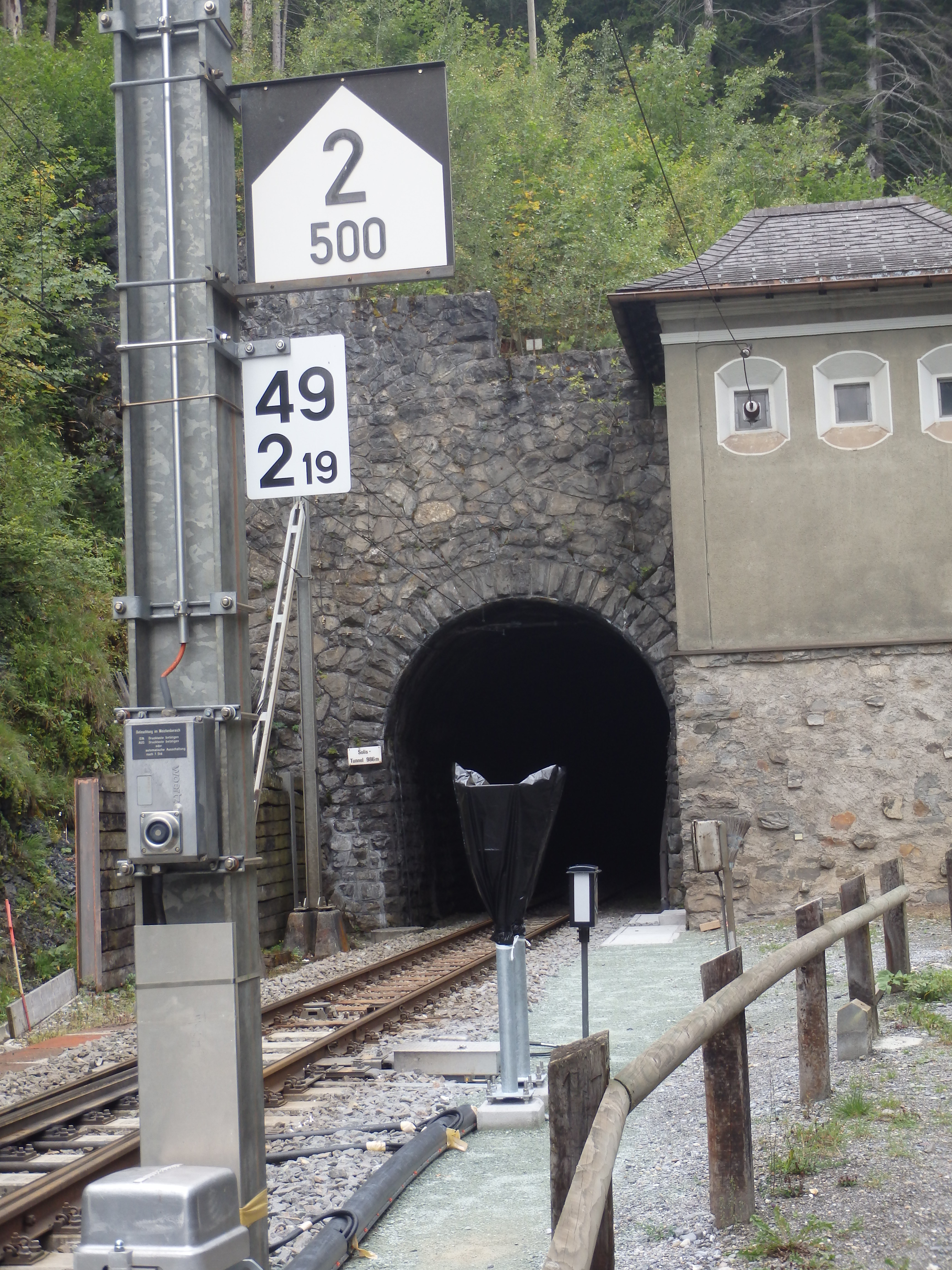 Neigungszeiger und Metertafel gemäß den Schweizerischen Fahrdienstvorschriften (FDV) in Solis an der Albulalinie der Rhätischen Bahn (RhB). Im Hintergrund Ostprotal des Tunnels Solis.Der Neigungszeiger oben im Bild signalisiert den Beginn einer Steigung. Die gross geschriebene Zahl gibt die Steigung in Promillen, die klein geschriebene Zahl die Länge der betreffenden Steigung in Metern an. Die Metertafel unten im Bild zeigt die Kilometrierung. Die obere Zahl gibt den Kilometer, die untere den Meter an.Literatur: Bundesamt für Verkehr: Fahrdienstvorschriften. Bern, 2012. R 300.2, Abschnitte 2.6.4 und 2.6.5